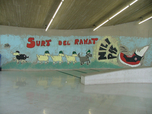 Mural antimilitarista, amb el lema "Surt del ramat", al campus de Bellaterra de la :Universitat Autònoma de Barcelona (UAB), esborrat l'any 2009.